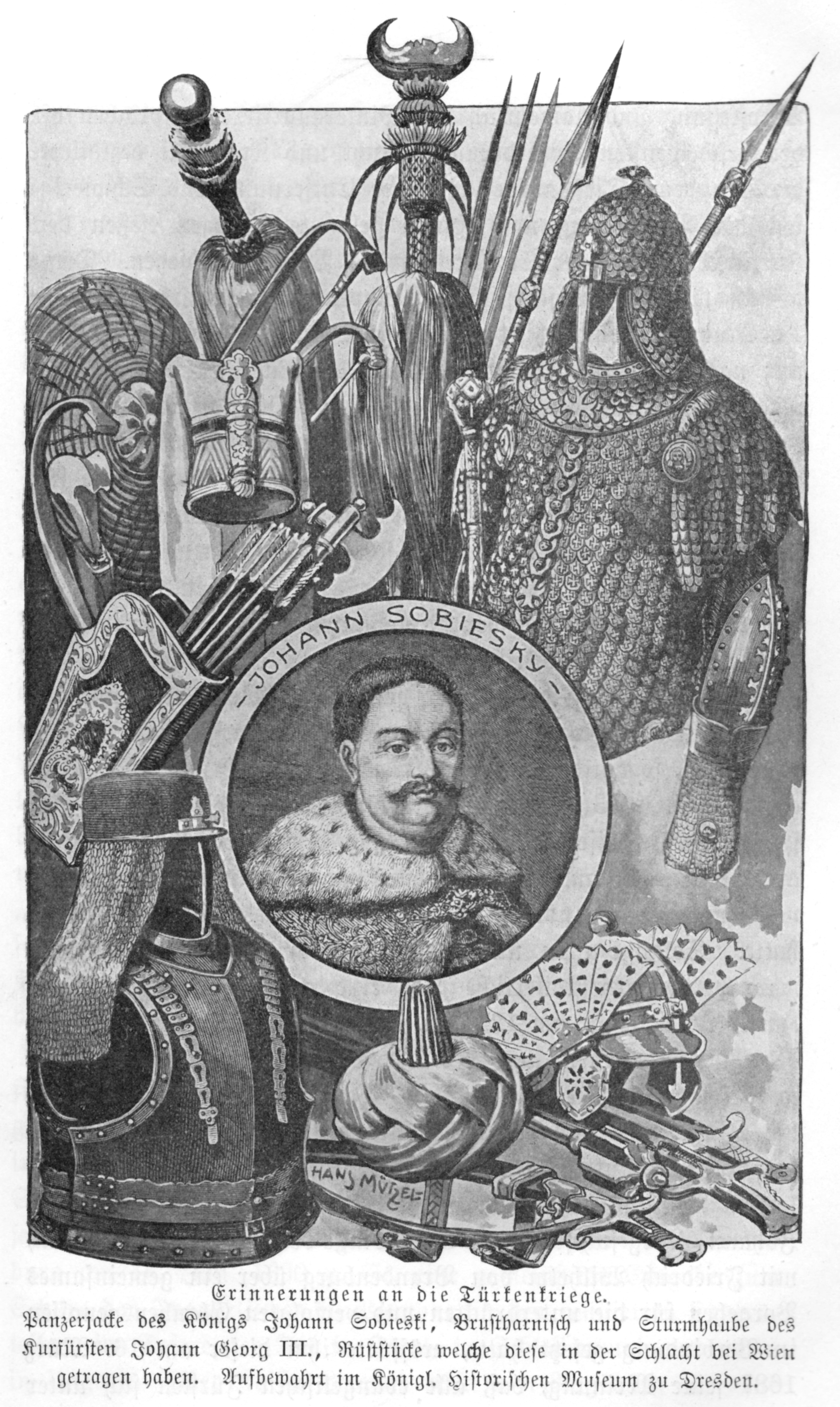 Erinnerungen an die Türkenkriege. Panzerjacke des Königs Johann Sobieski, Brustharnisch und Sturmhaube des Kurfürsten Johann Georg III., Rüststücke, welche diese in der schlacht bei Wien getragen haben. Aufbewahrt im königl. historischen Museum zu Dresden.